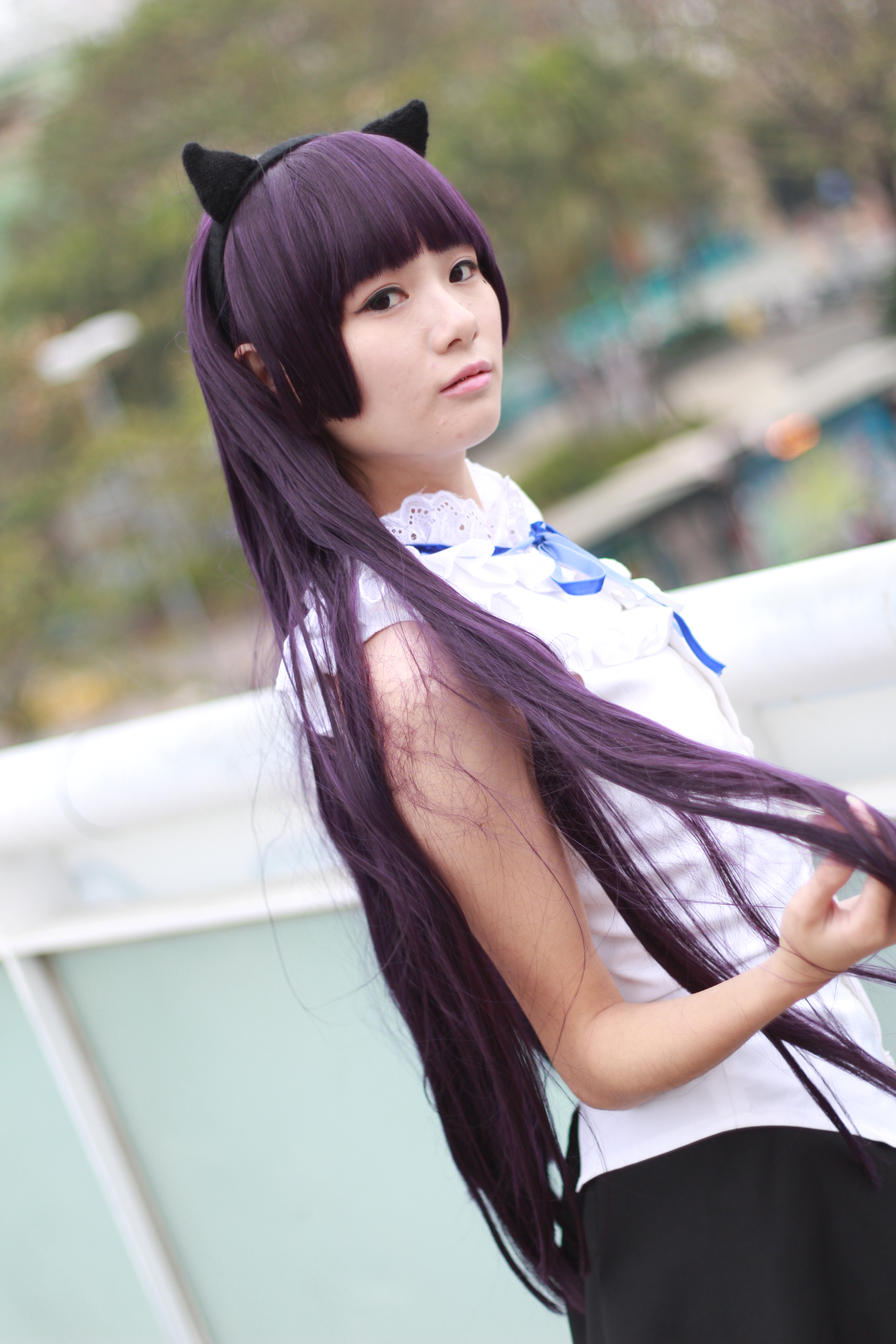 第23屆Wing Stage動漫遊戲創作展，《我的妹妹哪有這麼可愛！》五更琉璃cosplayer。